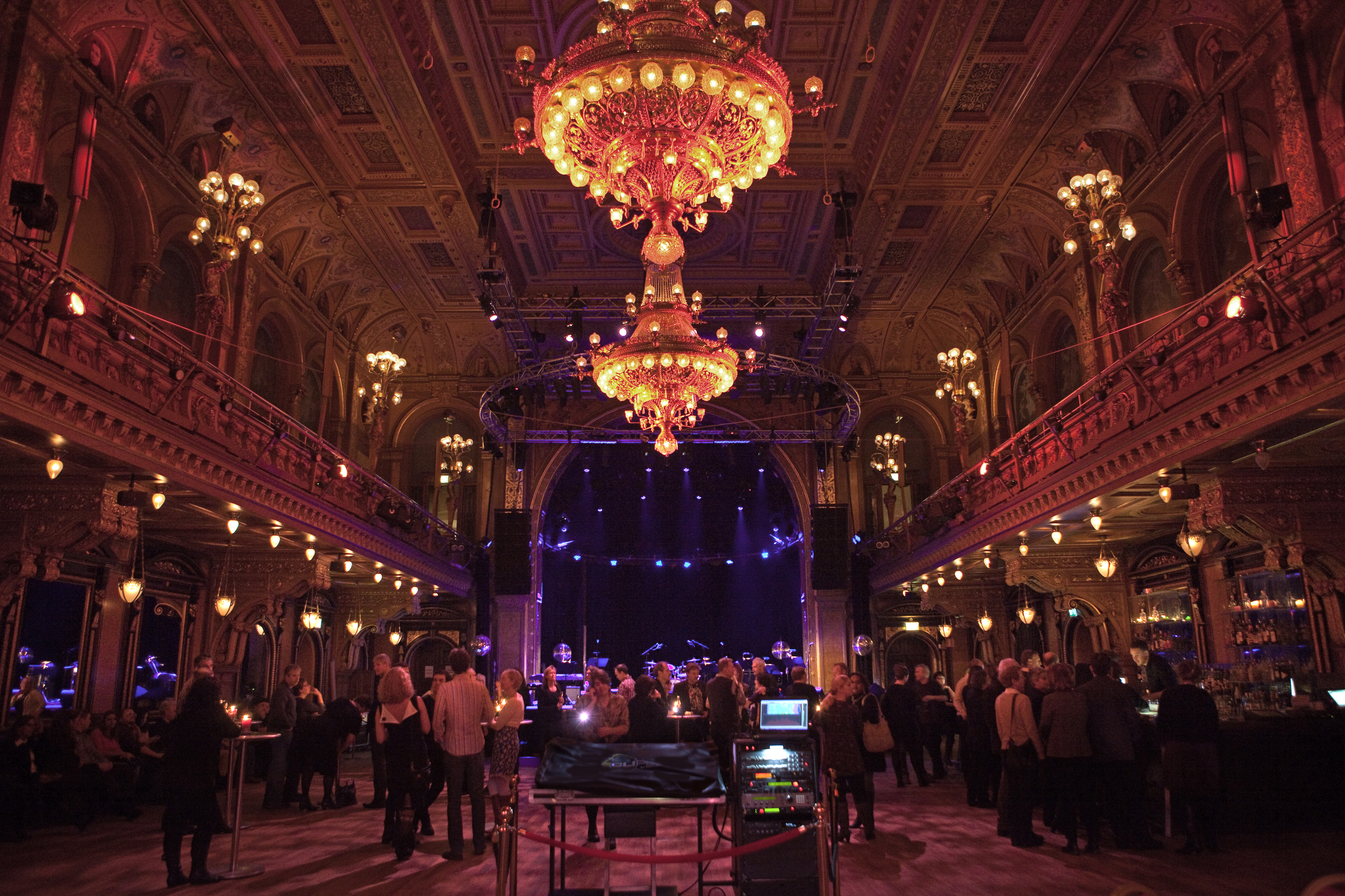 Berns, Stockholm, 8 January 2011.